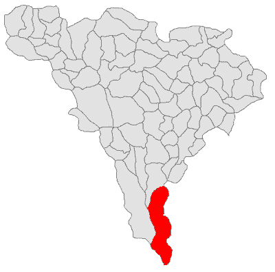 Categorie:Hărţi ale judeţului Alba